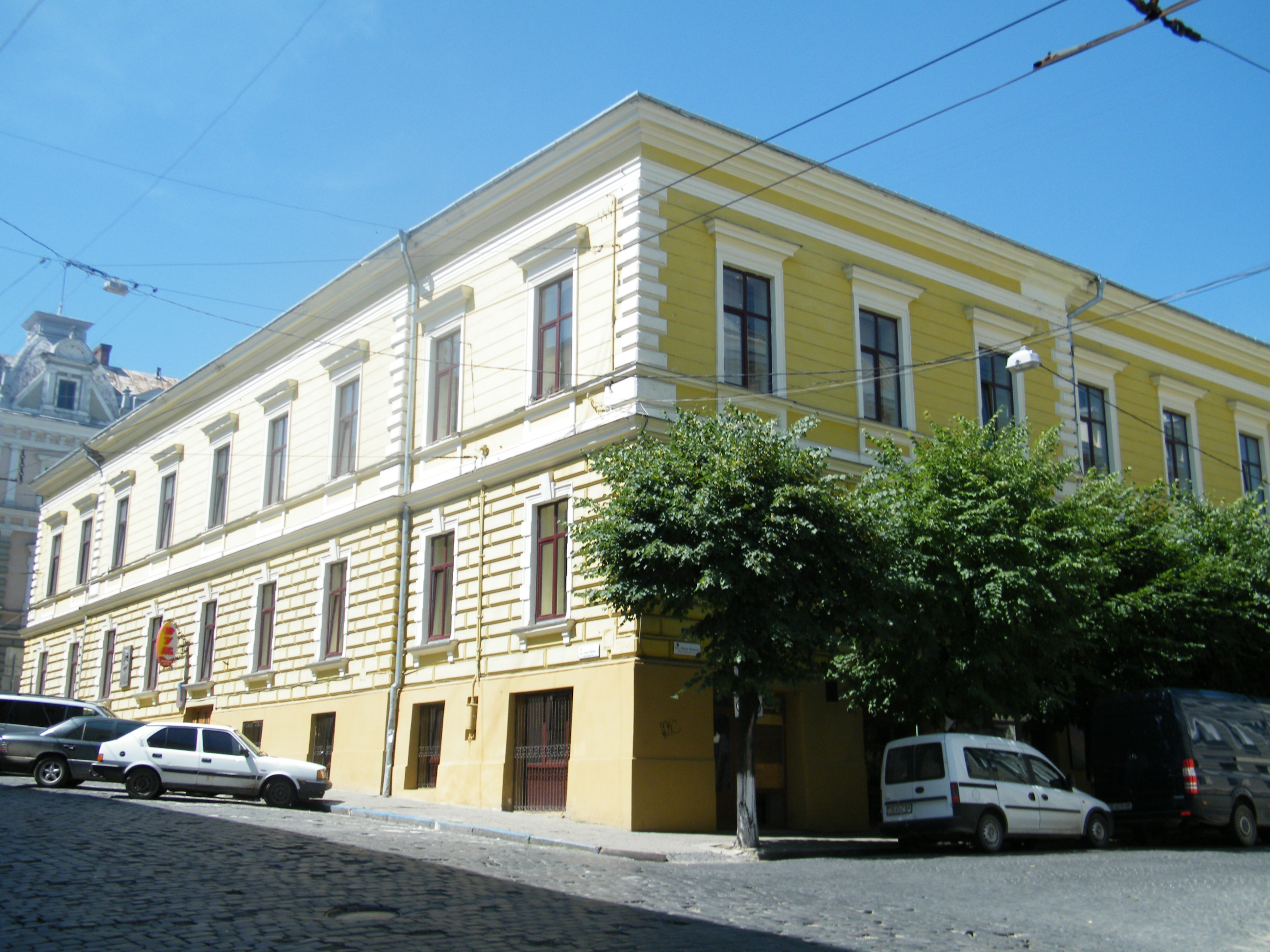 Будинок гімназії, де навчався Міхай Емінеску, Чернівці